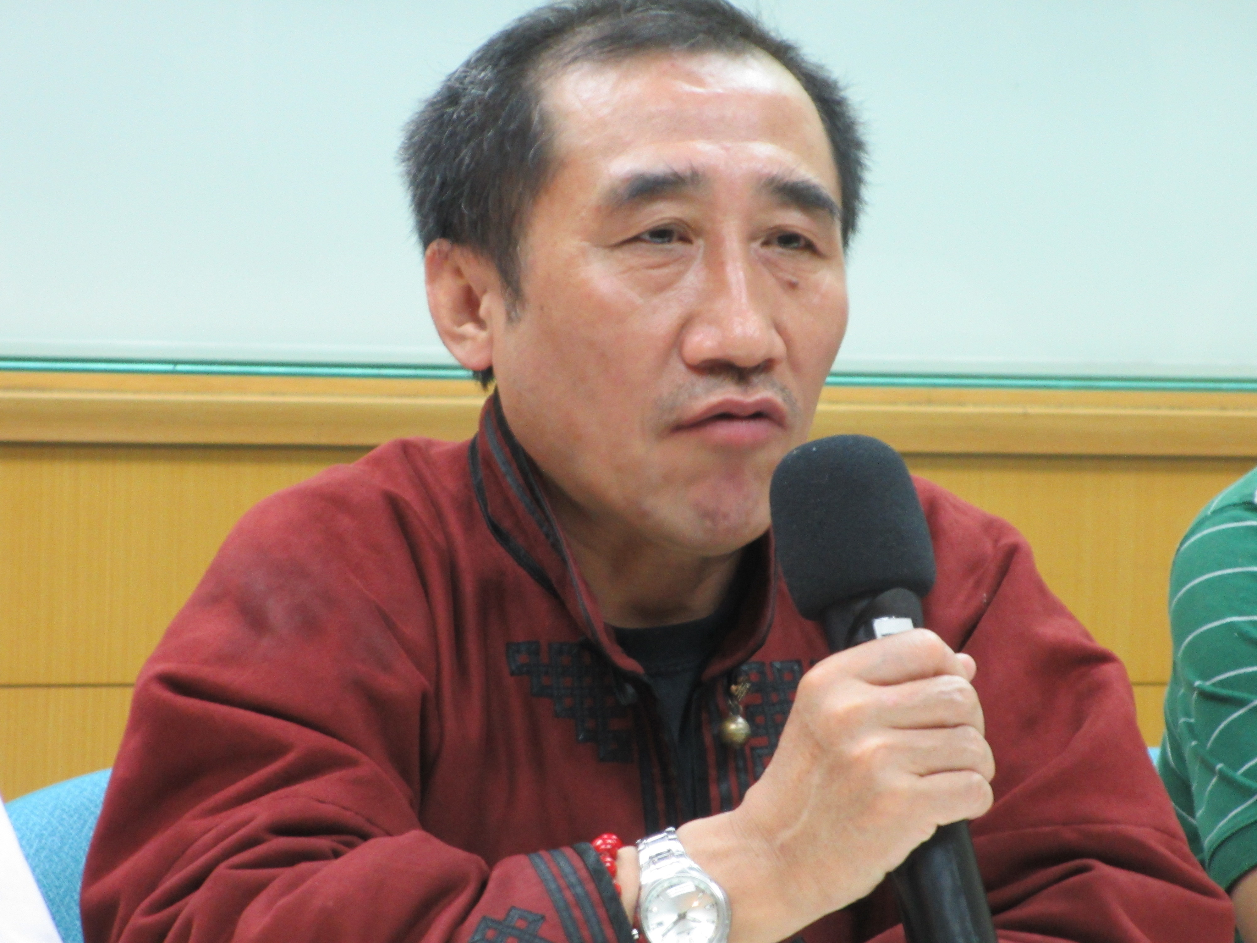 內蒙古人民黨主席特木其勒圖。中文（中国大陆）: 内蒙古人民党主席特木其勒图。